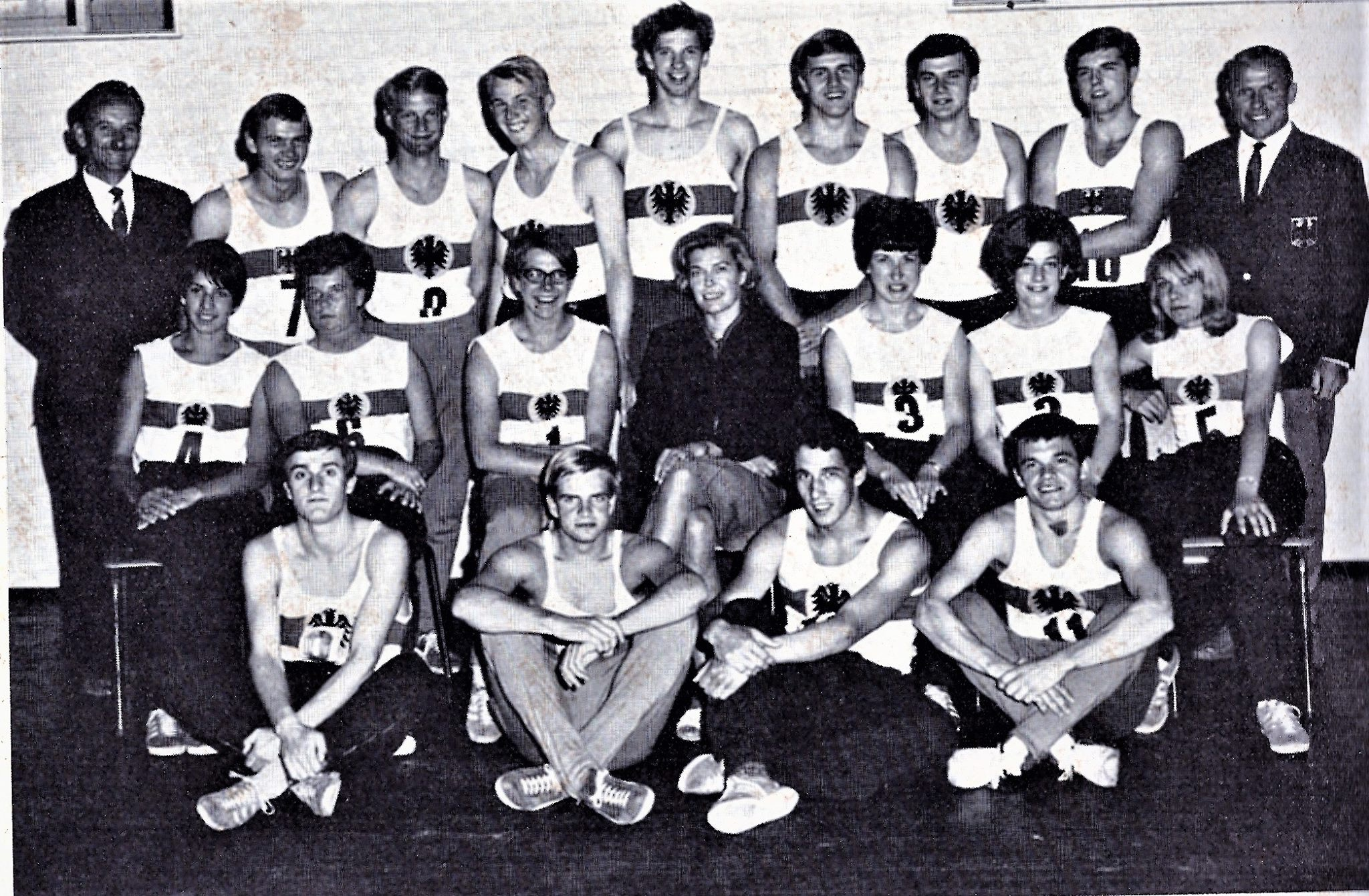 Junioren Auswahlmannschaft des Deutschen Leichtathletikverbandes (DLV) in Windhuk, der ersten Station einer Wettkampfreise durch Südwest und Südafrika, Oktober/November 1966.